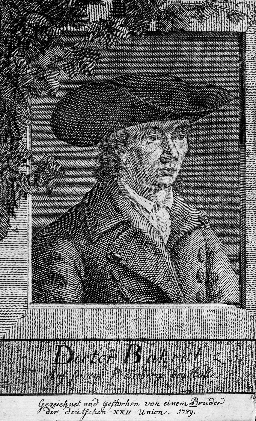 Porträt-Frontispiz aus D. Carl Friedrich Bahrdts unruhiges Leben, sein Tod und Begräbniß, für Neu- und Wißbegierige beschrieben. Zweyte Auflage. Halle, Dreyßig, 1792.